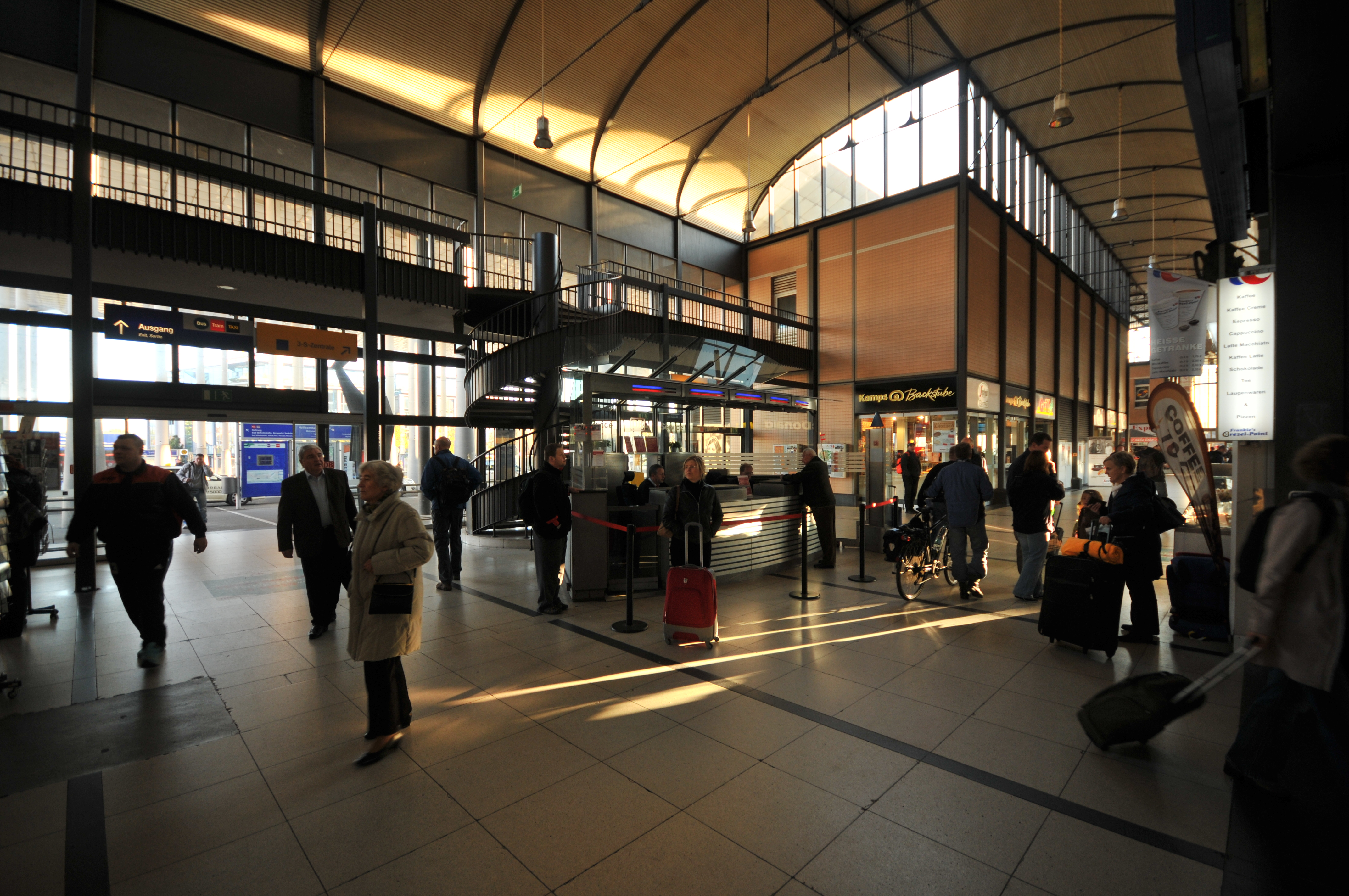 Kassel Bahnhof Wilhelmshöhe